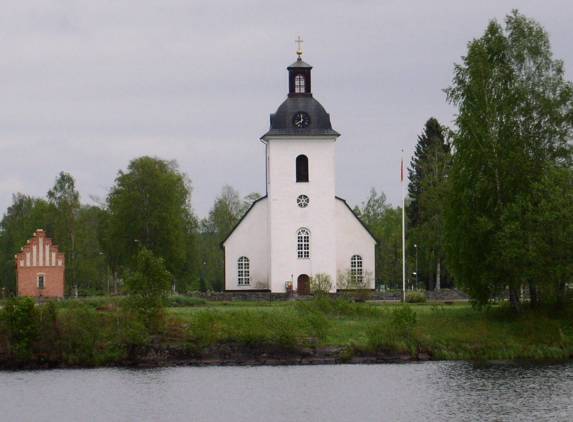 Nås kyrka i Dalarna